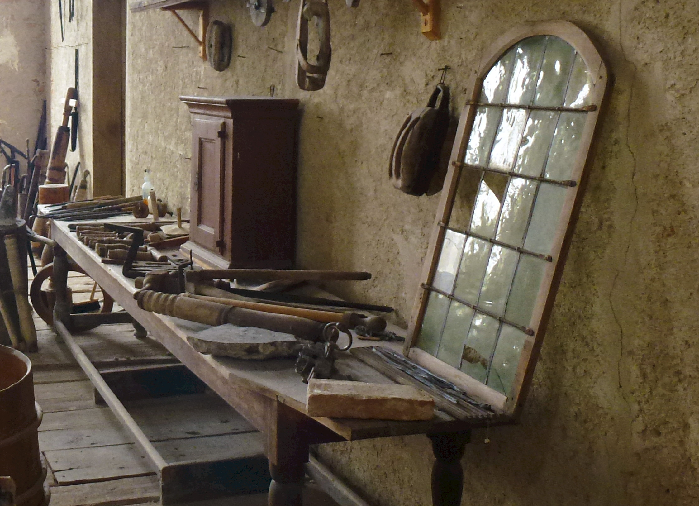 Ett original blyglasat fönster i ofullbordade salen